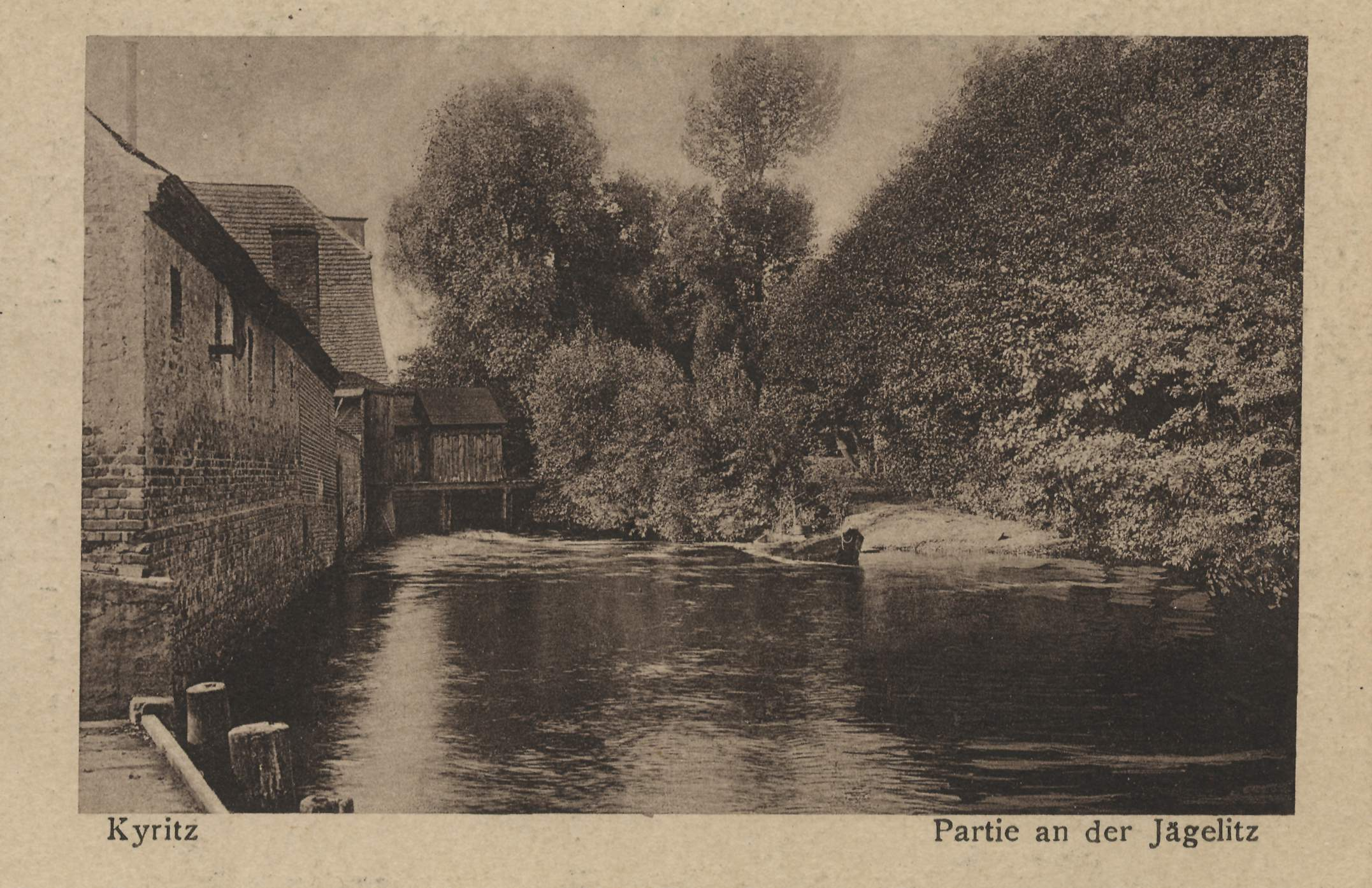 Jägelitz